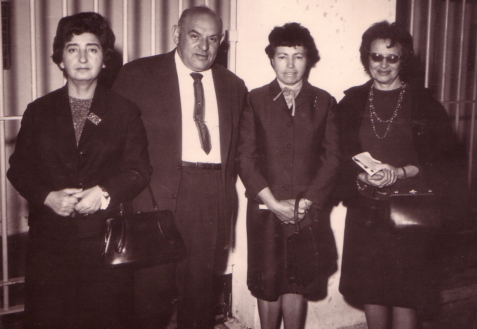 מלכה ברוורמן (קיצונית משמאל) עם לילי קסטל (קיצונית מימין) ורבקה הראל (אשתו של איסר הראל) (תחילת שנות ה-60')